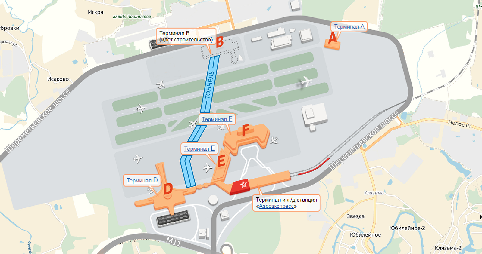 Межтерминальный переход в Шереметьево